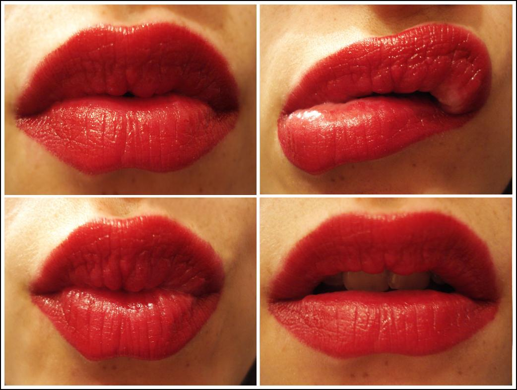 Lipstick